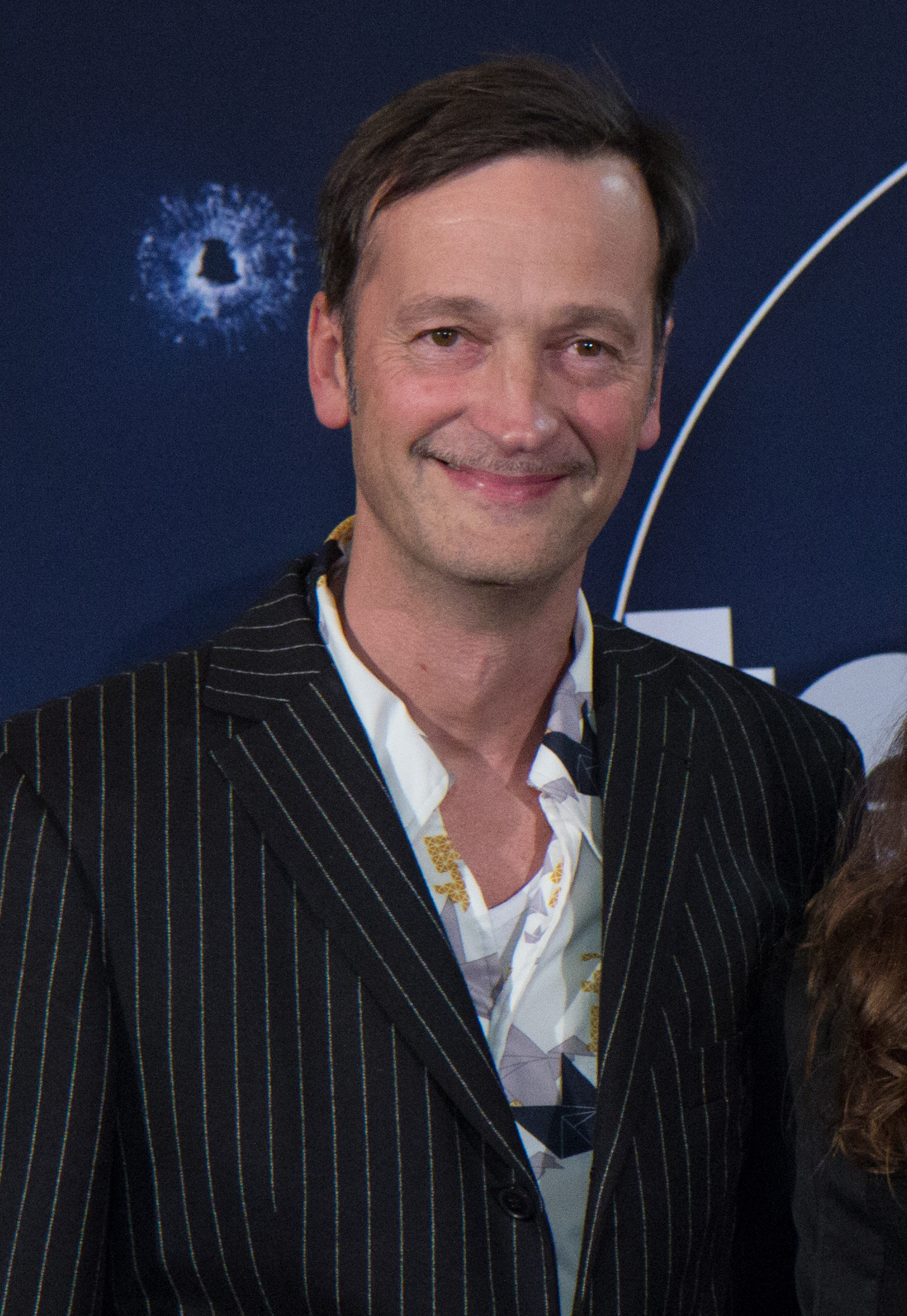 Fotocall im Rahmen der Preview des Tatorts „Der wüste Gobi“ u.a. mit Nora Tschirner.